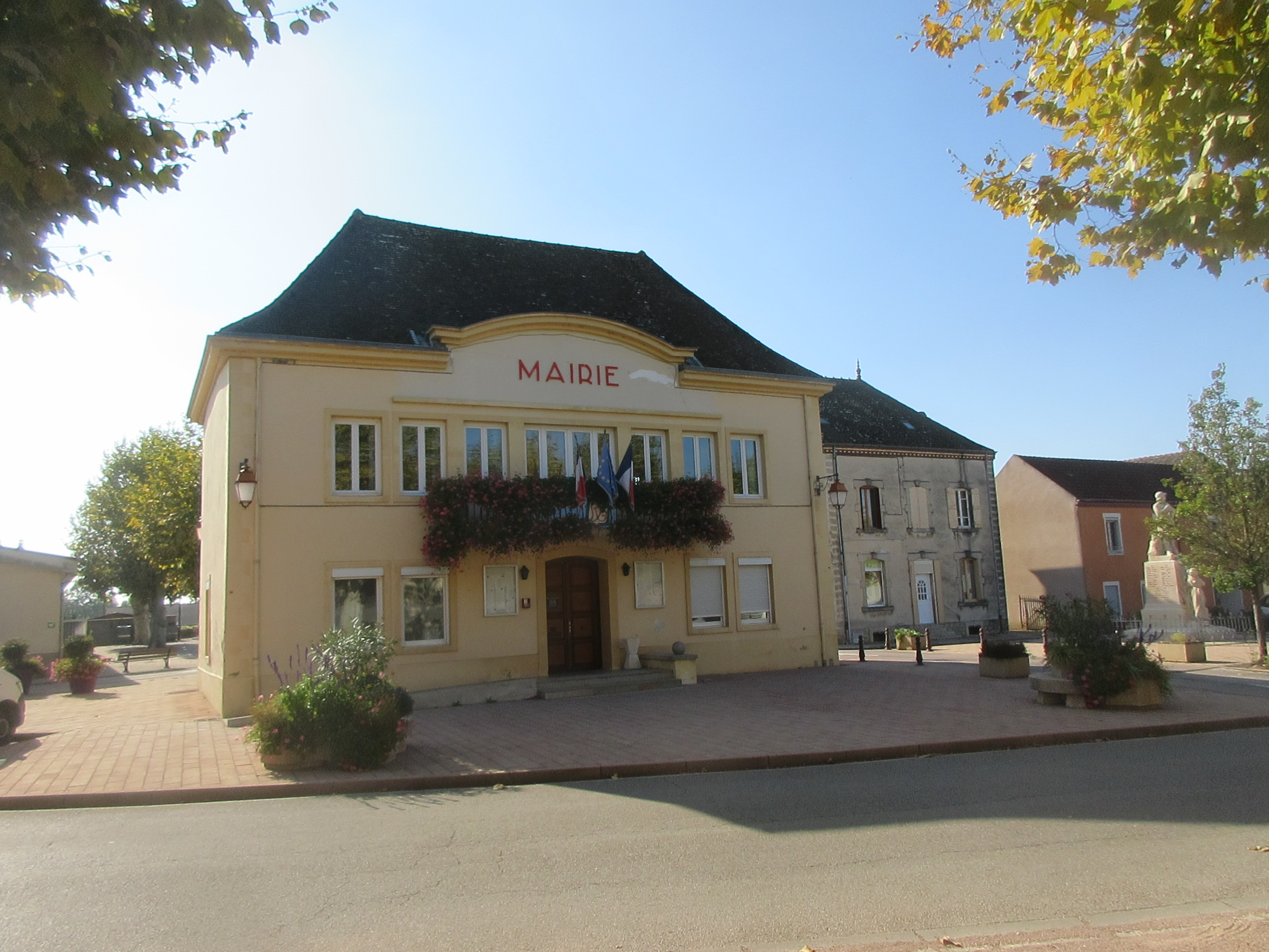 Mairie de Simandre, Saône-et-Loire.